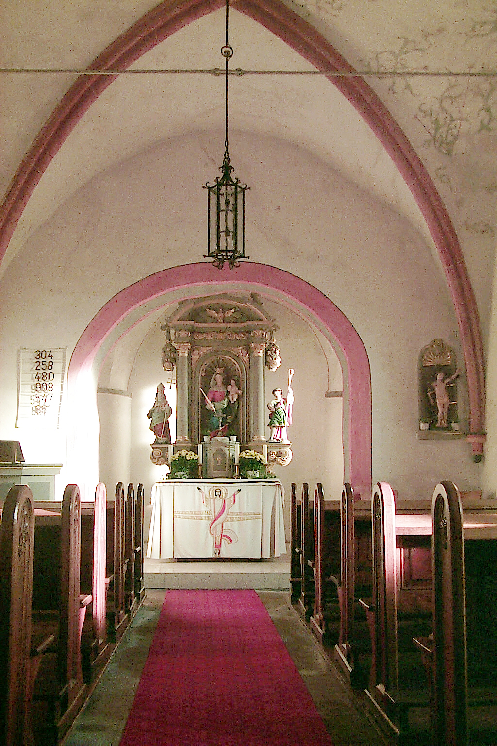 St. Sylvester (Minden (Sauer)) - Innen